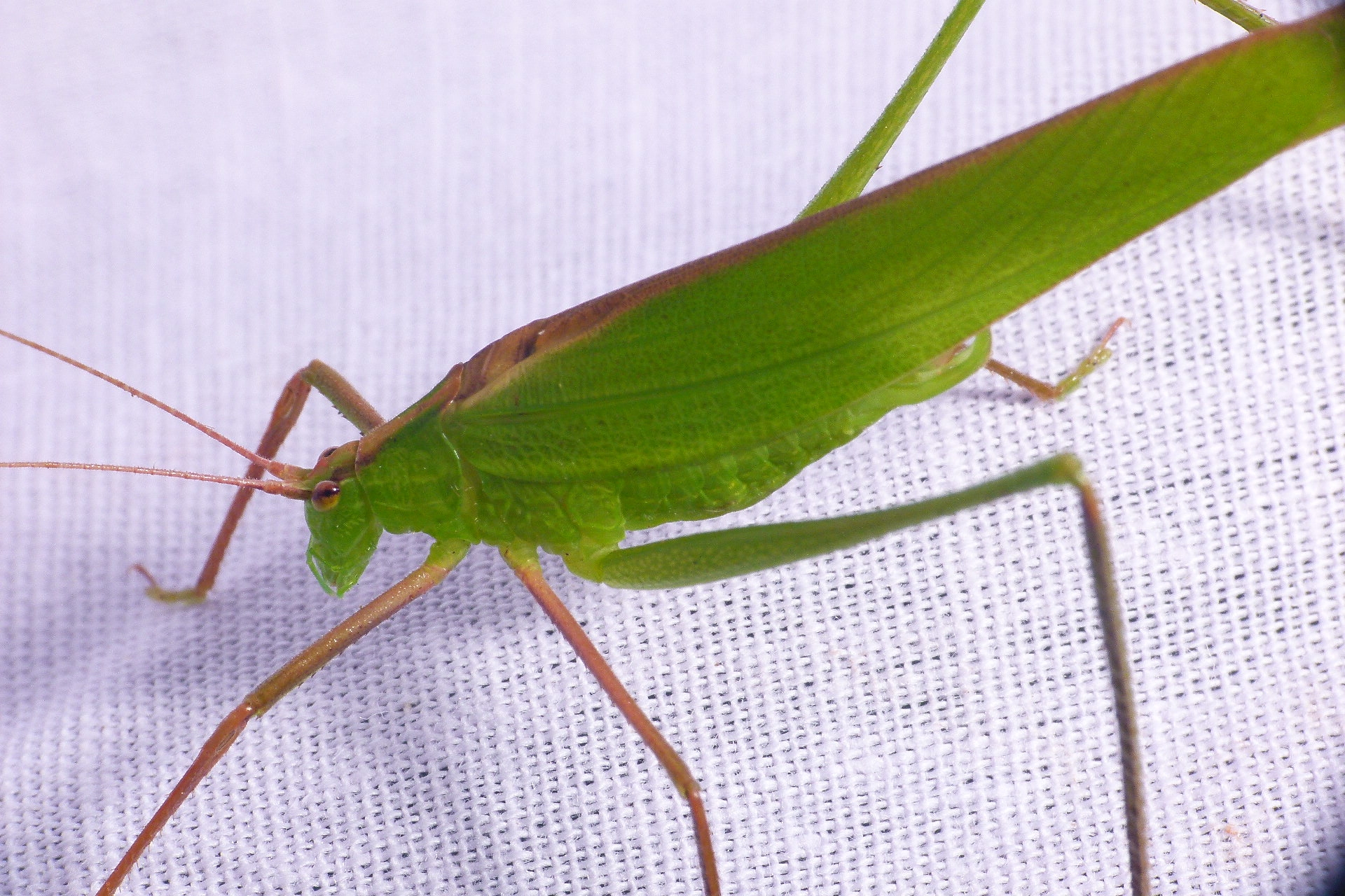 Ducetia sp. Tettigoniidae. Mudigere, India